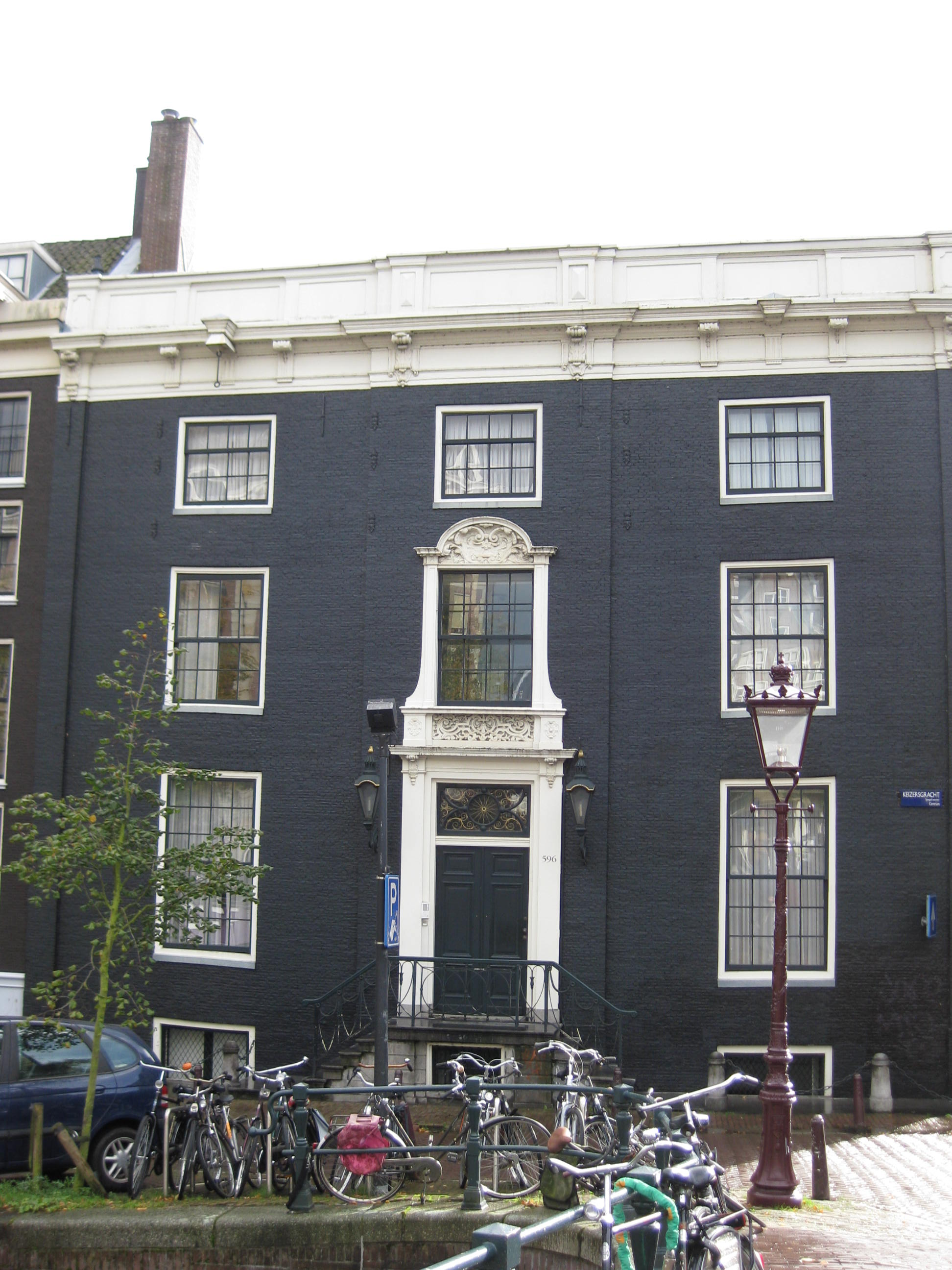 Keizersgracht 596, Amsterdam